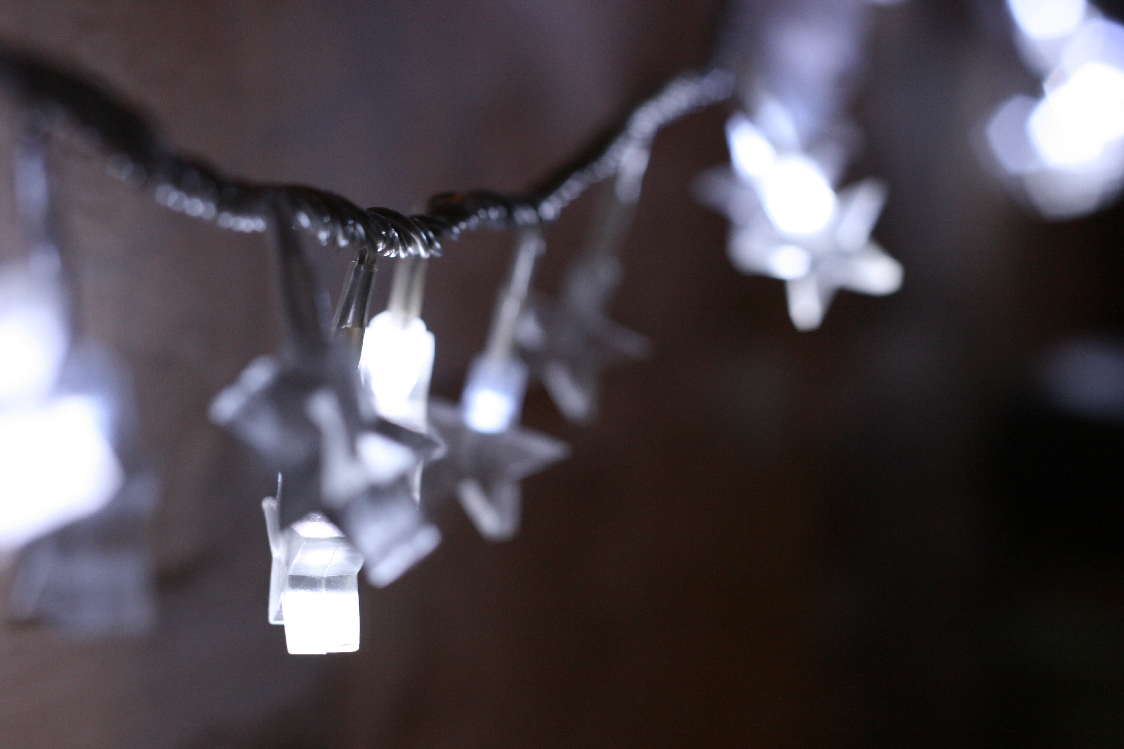 guirlande lumineuse étoiles